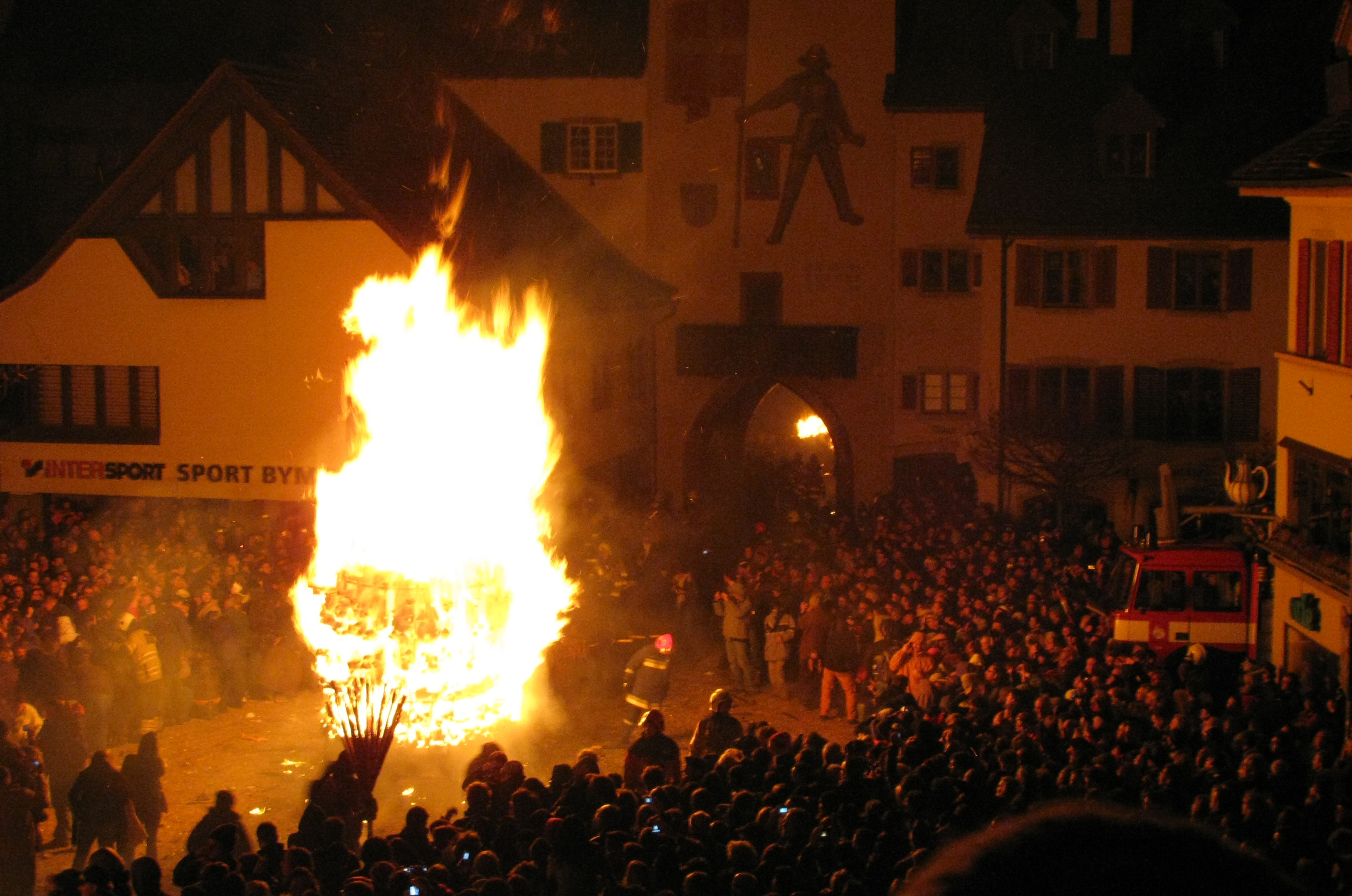 Chienbäse at Burgstrasse/Obertor in Liestal 2009